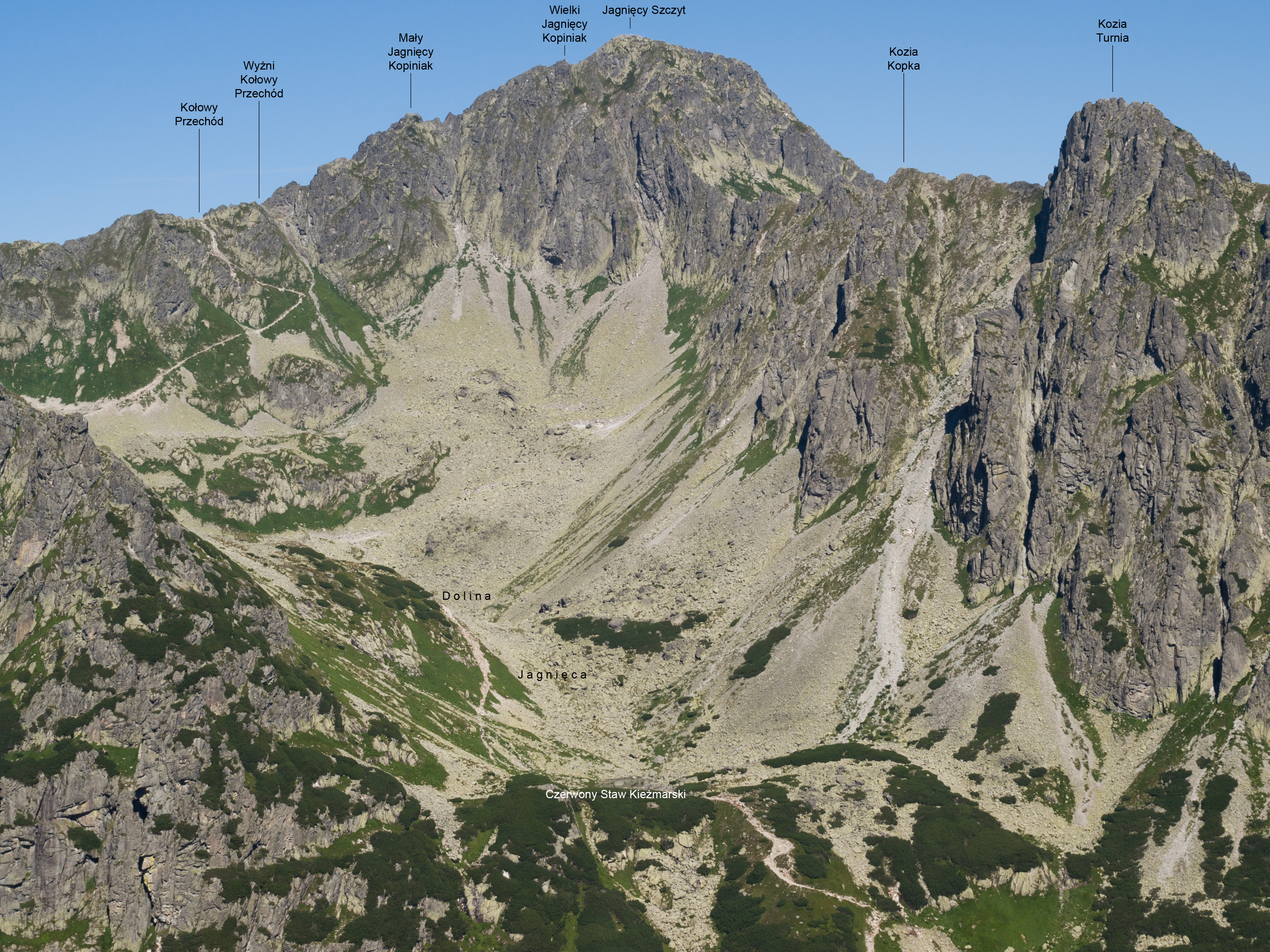 Jagnięcy Szczyt i jego granie ponad Doliną Jagnięcą. Podpisane obiekty.